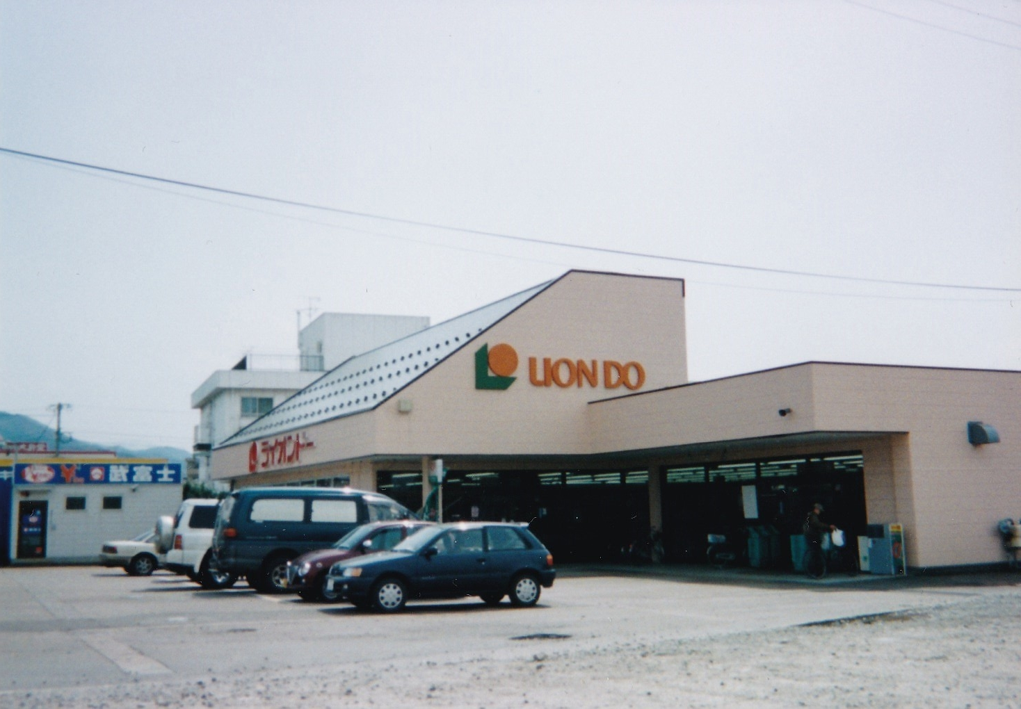 ライオンドー千石店外観1（2001年頃撮影）、フィルムカメラで撮影